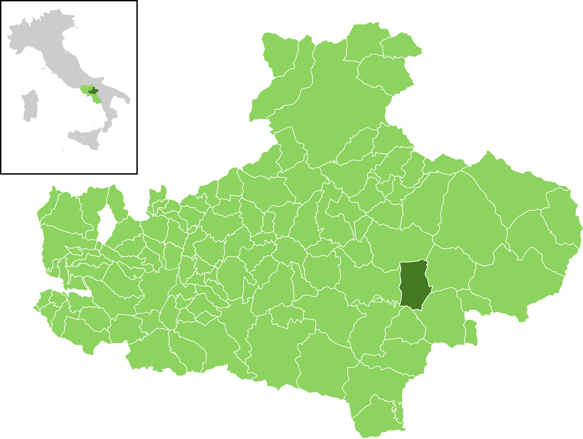 Posizione del comune all'interno della provincia di Avellino